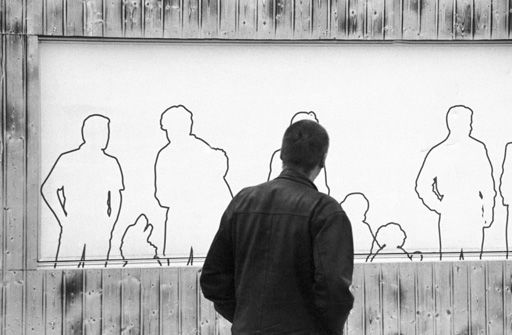 Soziologie #01, Fotografie aus dem Fotozyklus Sichtbare Soziologie von Andreas Bohnenstengel